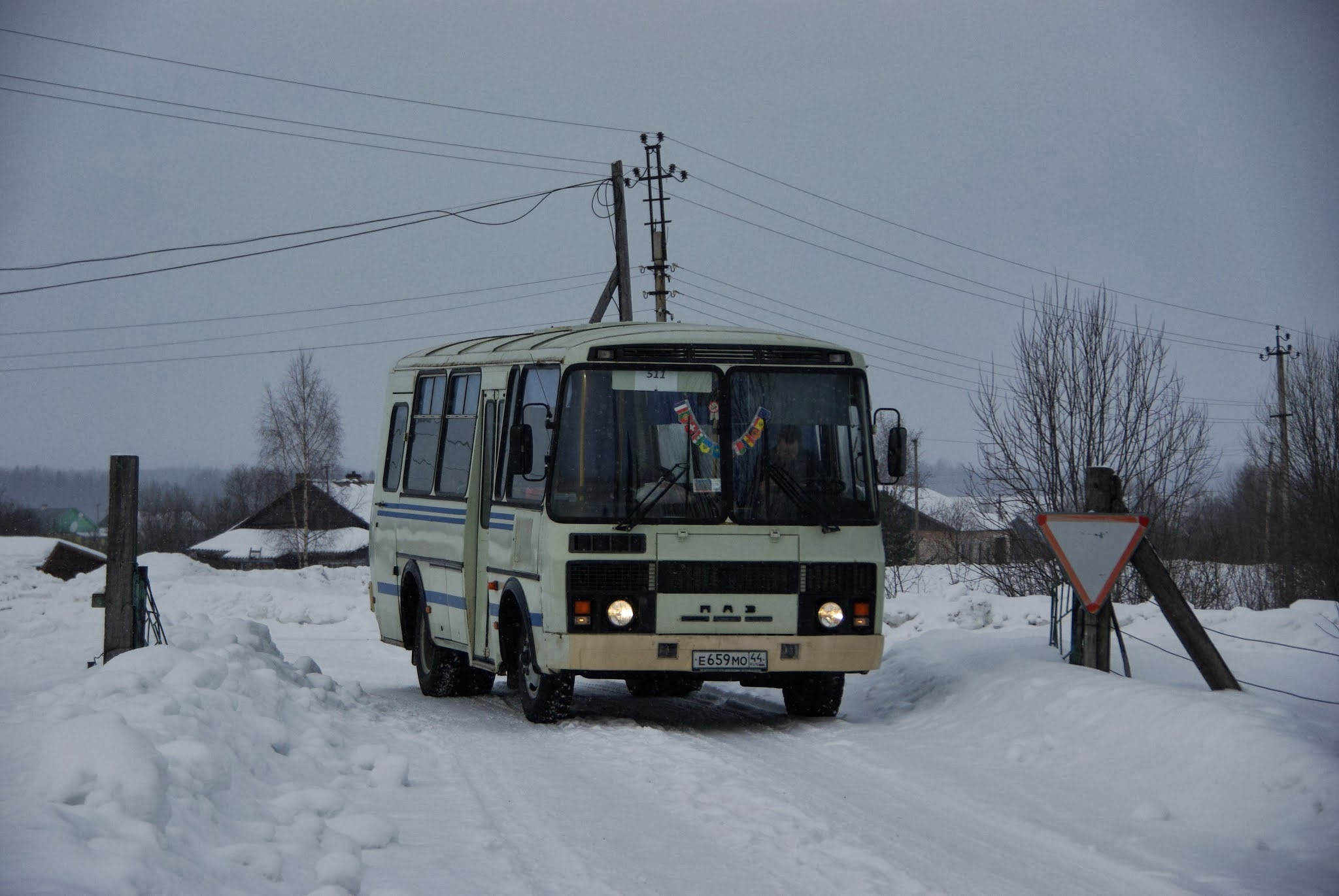 Nozhkino, Kostromskaya oblast', Russia, 157143